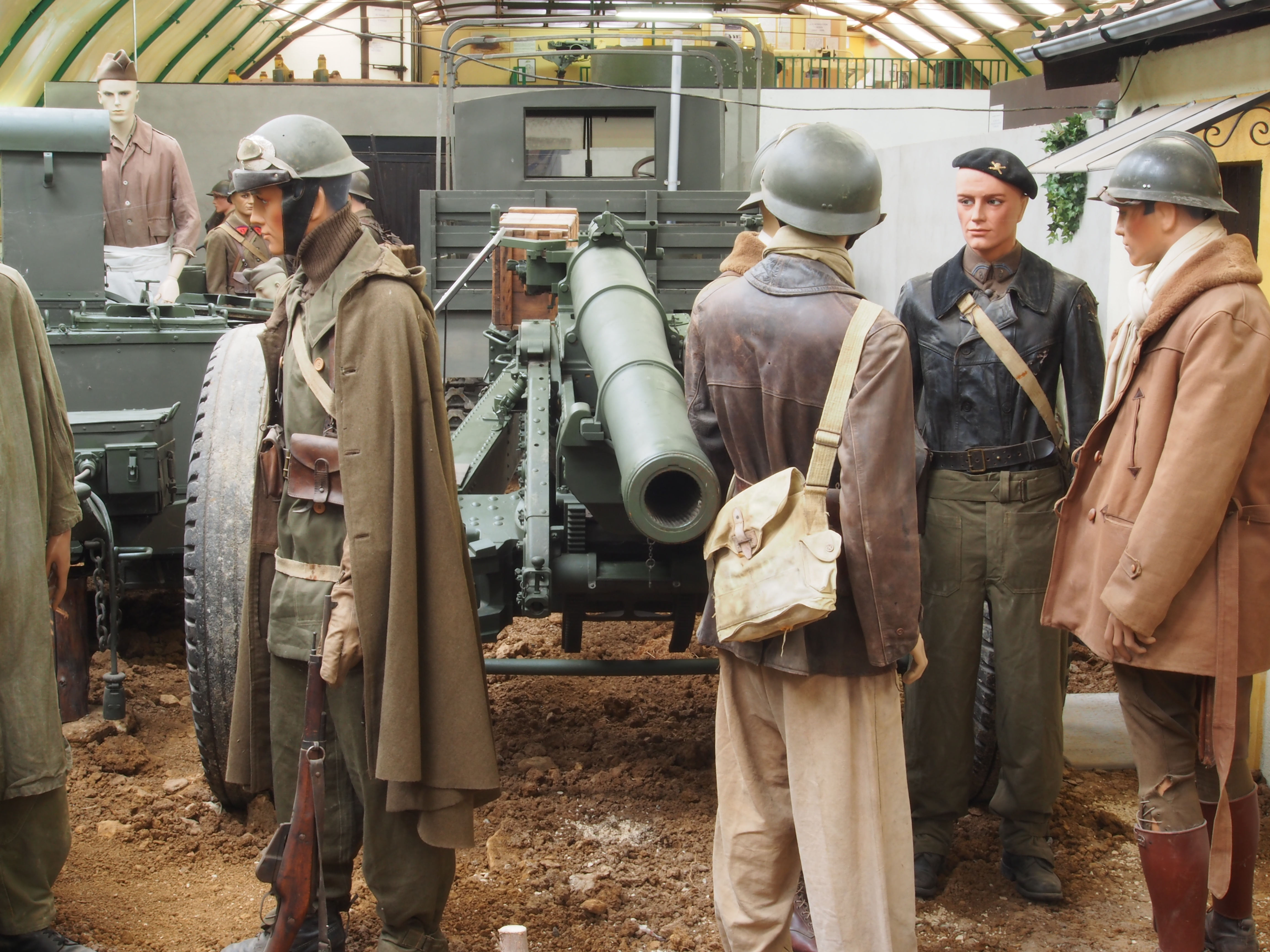 Fort de Fermont and its museum - Schneider 105 L mle 36 canon.